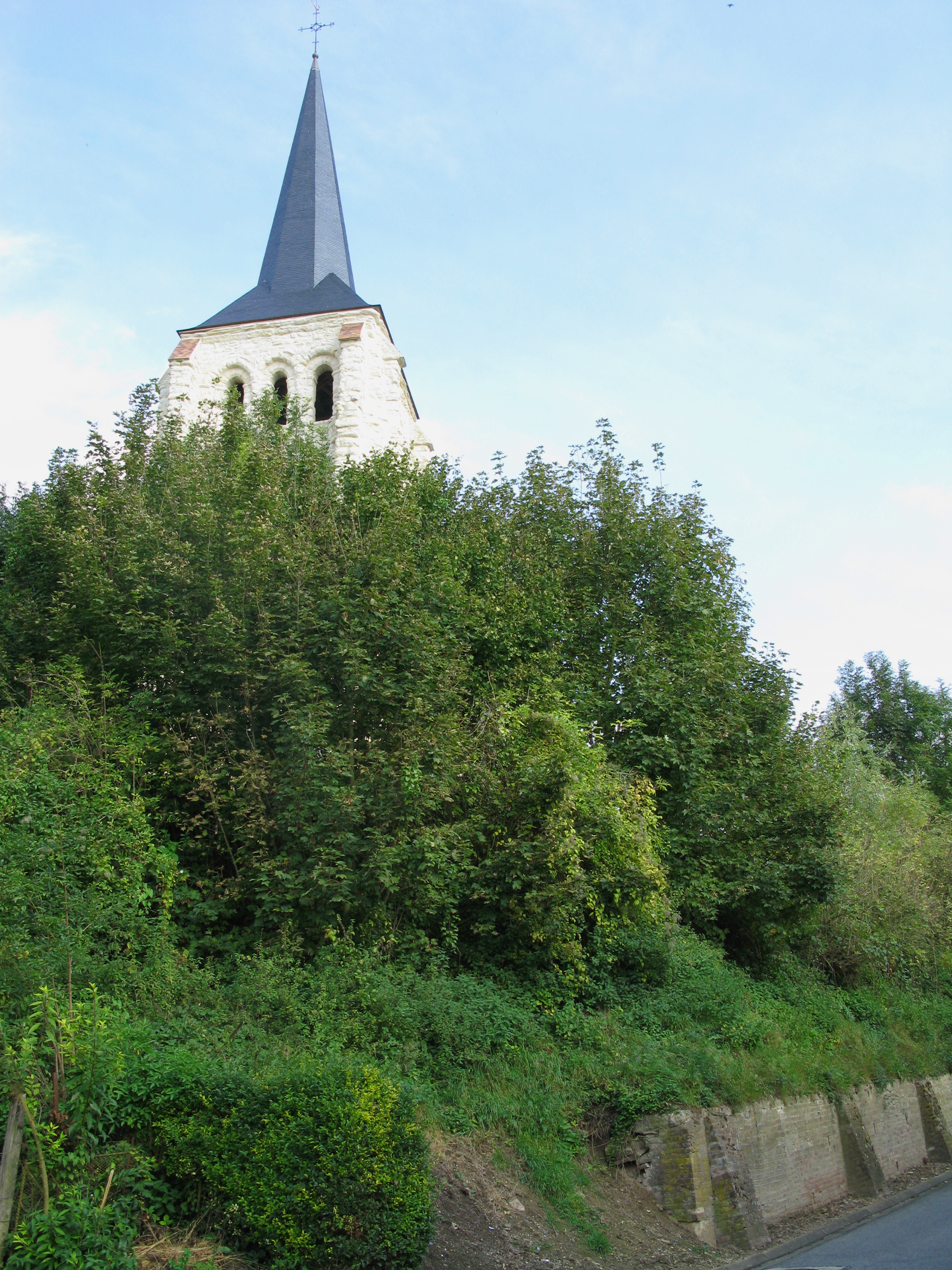 Tavaux-et-Pontséricourt (Aisne, France) - Le clocher de l'église fortifiée. Le clocher de pierre, d'un blanc éclatant dû à une restauration récente, surgit de la butte boisée surplombant une partie du village.